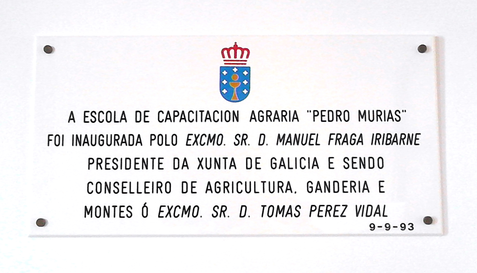 Placa de mármore descoberta na reinauguración Granxa Pedro Murias en Ribadeo